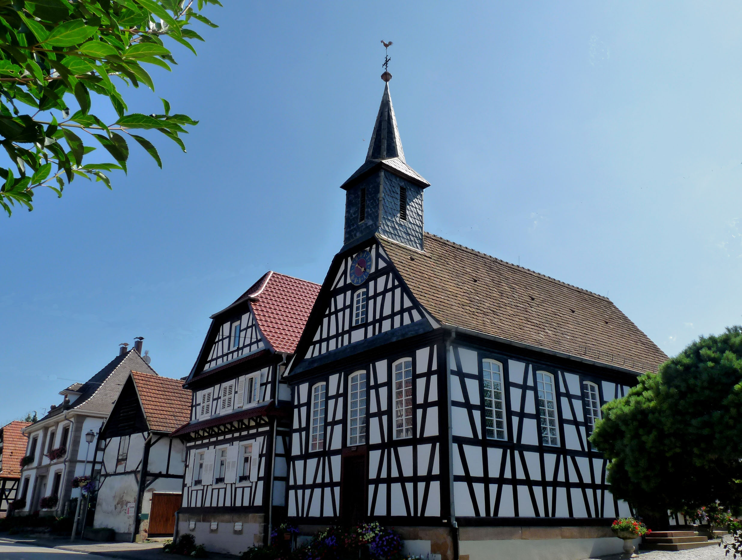 L'église de Kuhlendorf (Betschdorf, Bas-Rhin), église à colombages d'Alsace